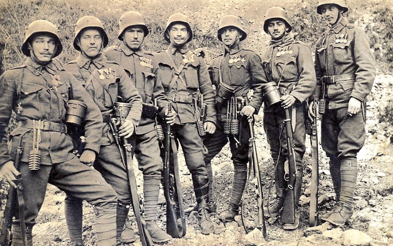 Pripadniki 17. pešpolka na Soški fronti.